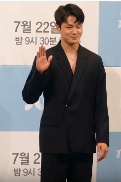 22일 오후 서울시 강남구 논현동 임피리얼 팰리스 서울에서 JTBC 새 월화드라마 '열여덟의 순간' 제작발표회가 열려 배우 김향기X신승호X강기영이 참석해 포토타임을 갖고 있다.